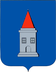 Herb miasteczka Jagielnica